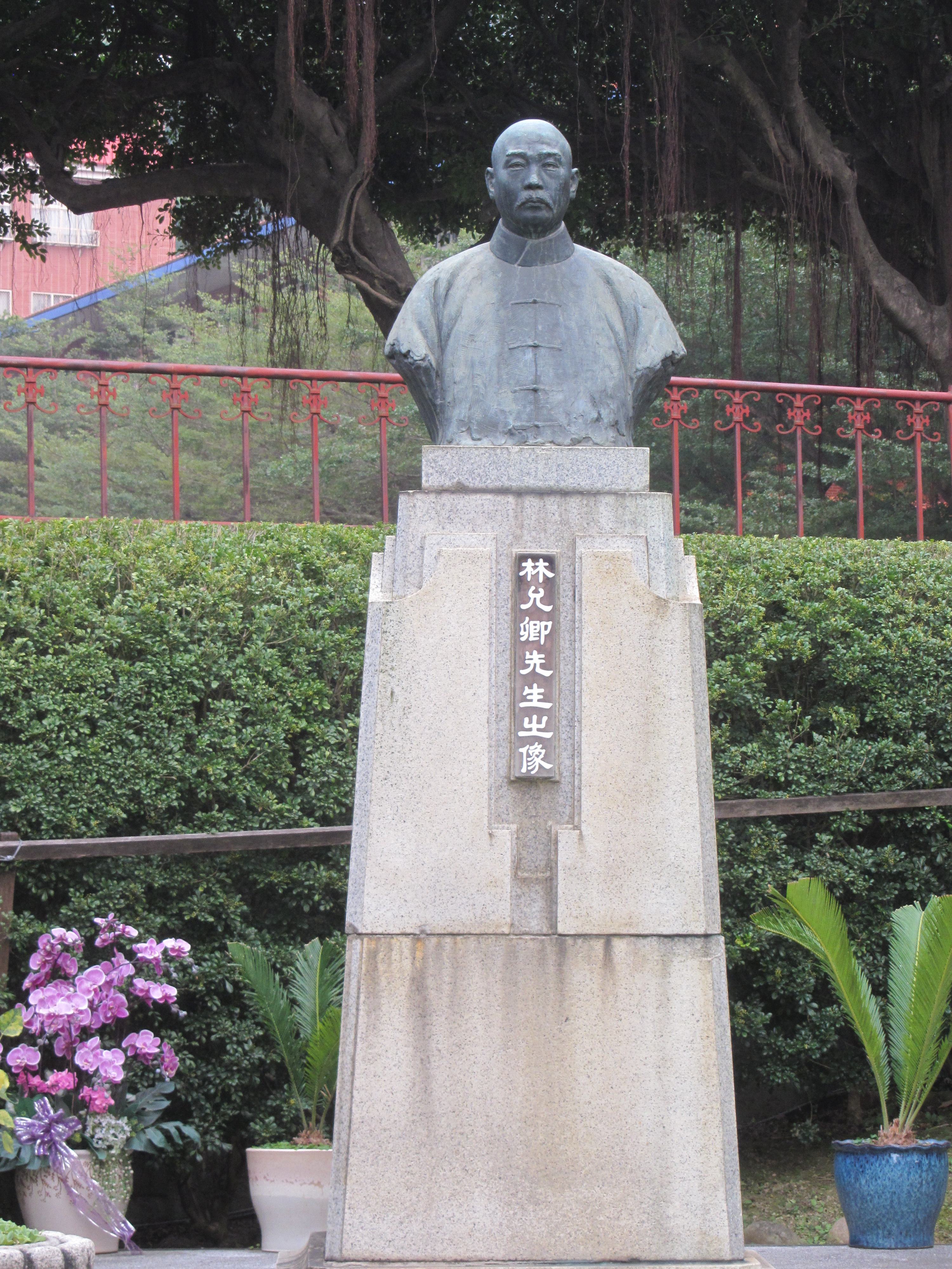 臺中市私立明台高級中學萊園內的林允欽（林文欽）胸像。